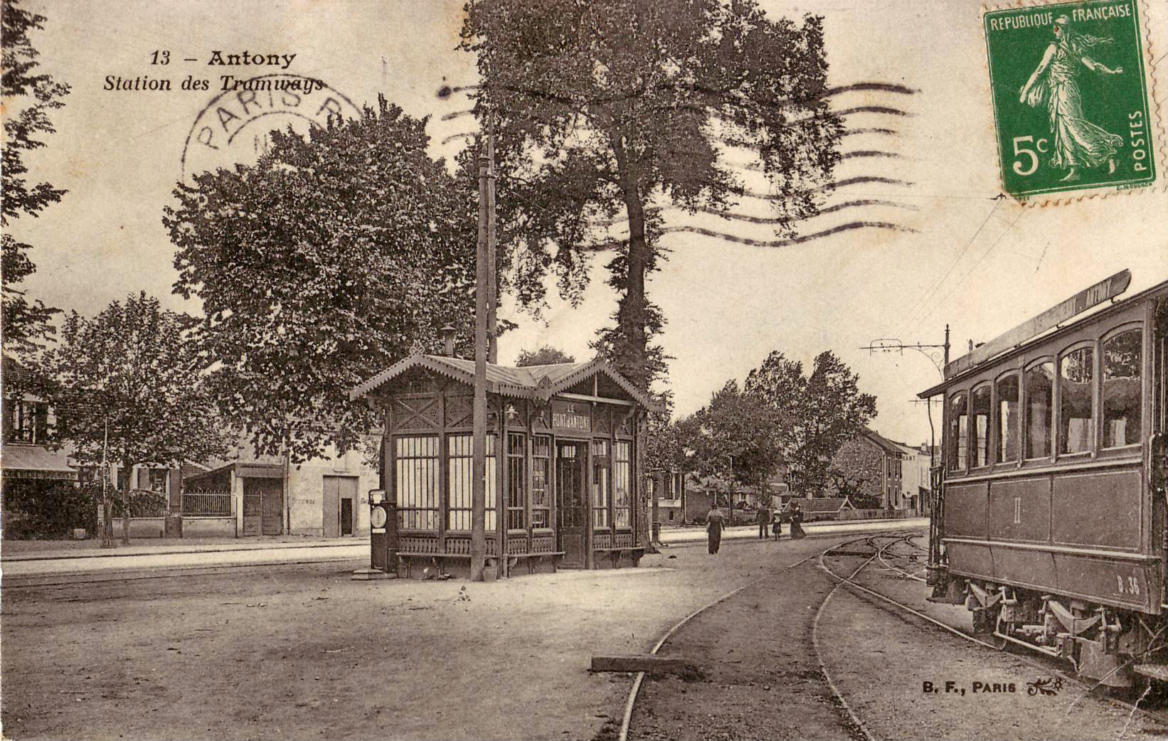 Carte postale ancienne éditée par BF à Paris, n°13 :ANTONY Station des Tramways (Bifurcation du Pont d'Antony de l'Arpajonnais : au fond, la voie unique non électrifiée vers Arpajon et Marcoussis, l'Aubette et les installations du terminus électrique et de la gare marchandise. L'automotrice B36 stationne à la droite du cliché.